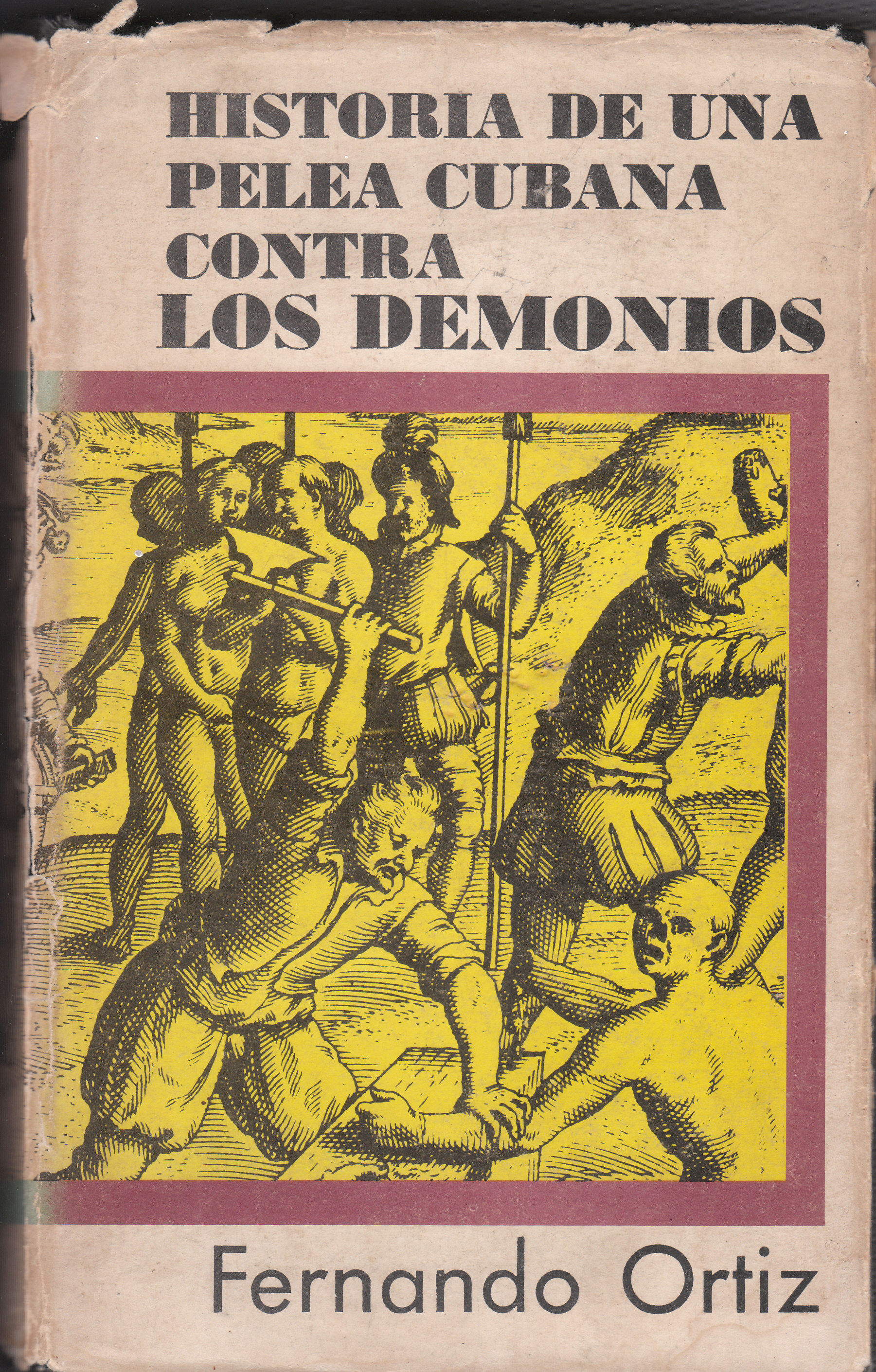 Historia de una Pelea cubana contra los demonios, edición de Ciencias Sociales, Cuba.